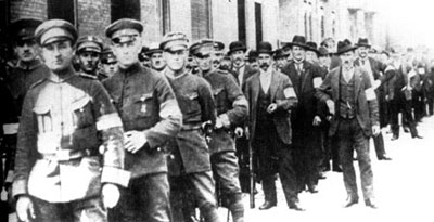 Powstańcy z Katowic przed wyjściem na front w maju 1921 r.